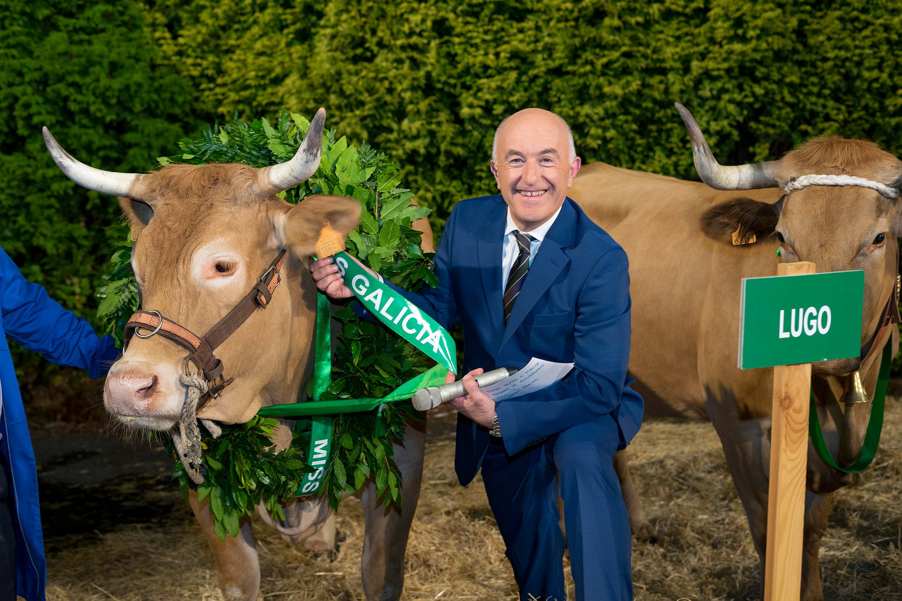 Xosé Ramón Gayoso xunto a gañadora do concurso Miss Vaca 2019